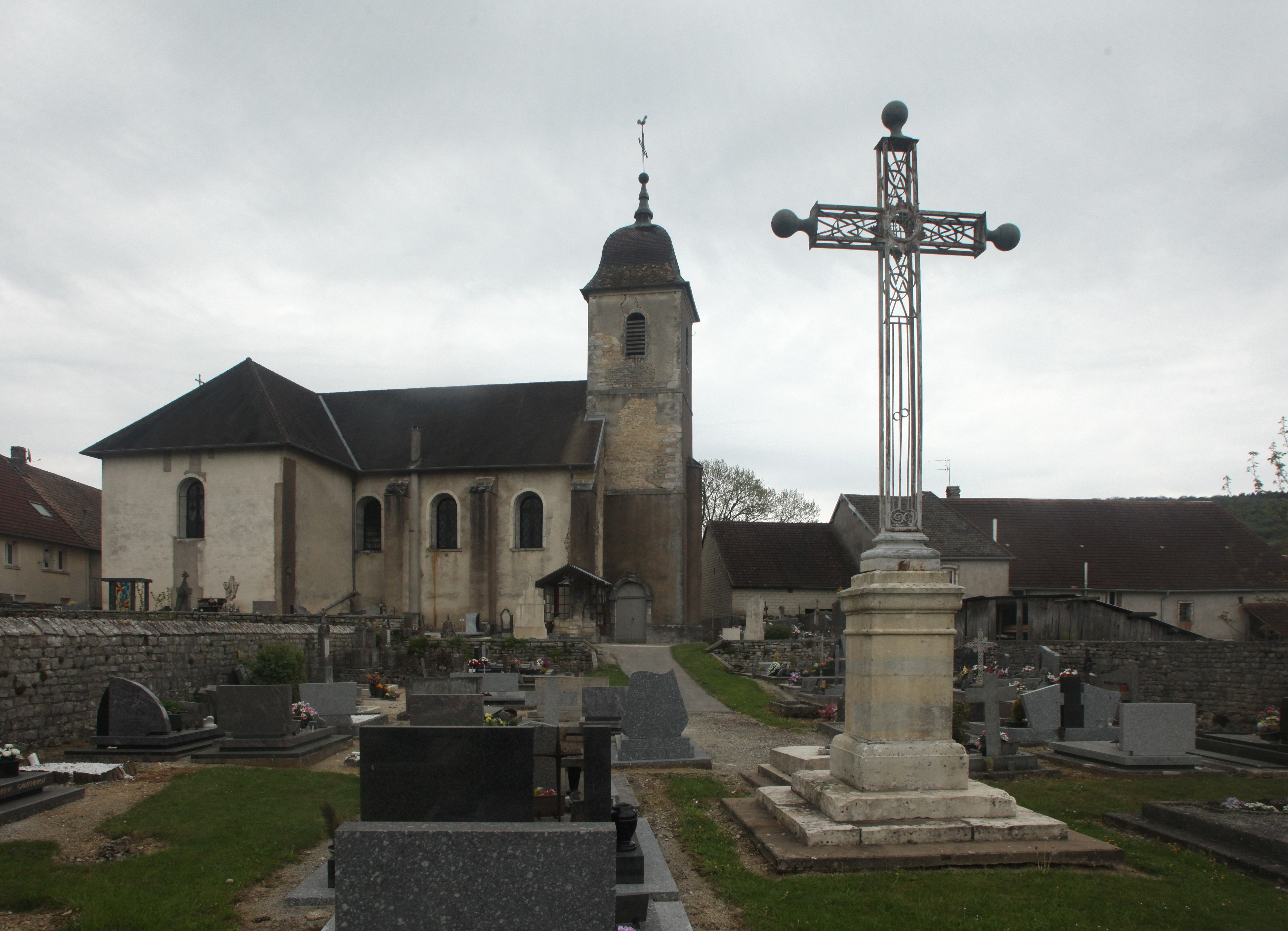 Église de Fourg (Doubs).